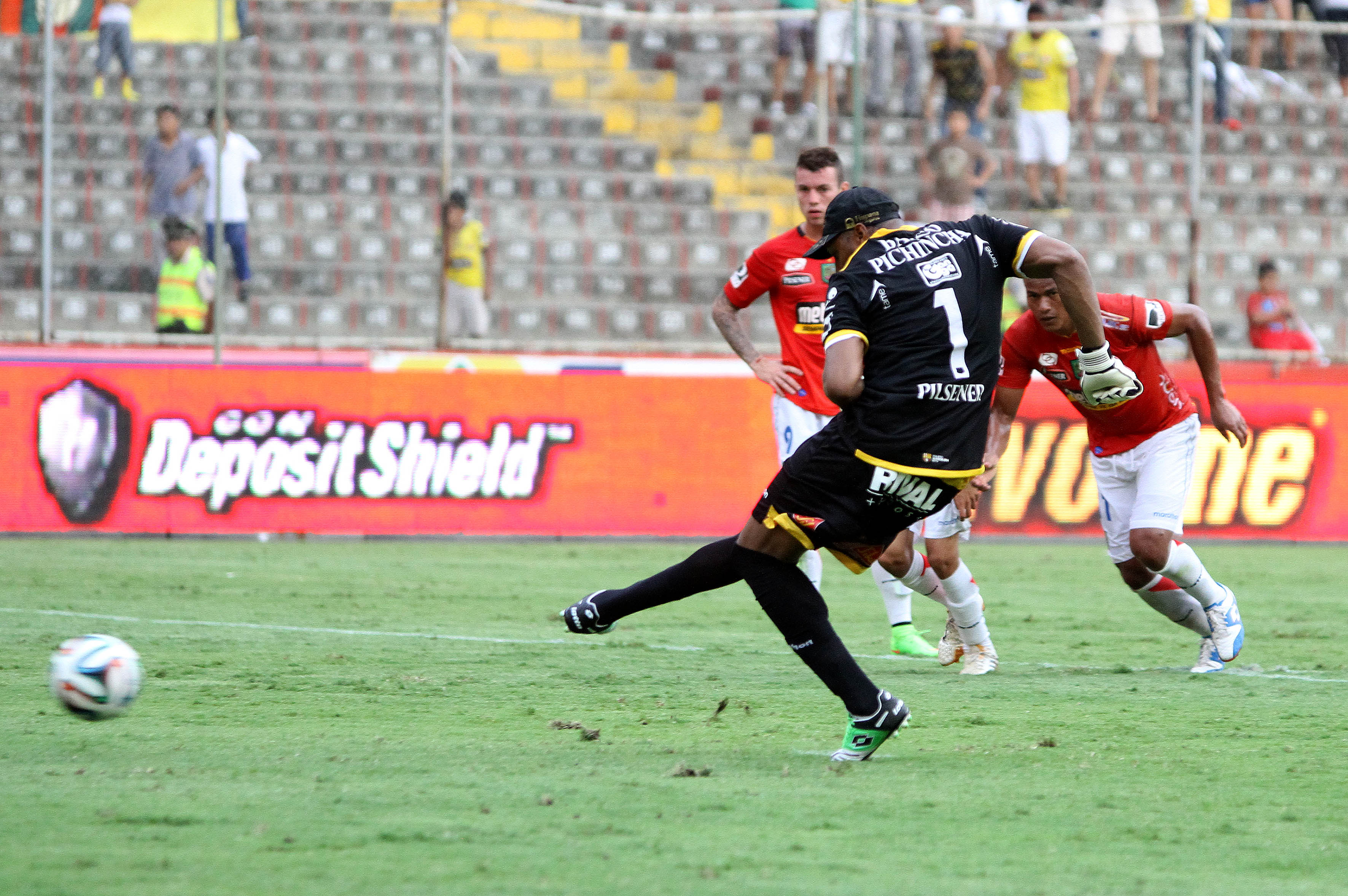 Guayaquil, 15 de noviembre del 2014 El portero del Barcelona Máximo Banguera anotó un gol desde el tiro penal ante el Deportivo Cuenca en el partido jugado en el estadio Monumental por la décima sexta fecha del campeonato nacional de fútbol César Muñoz/Andes